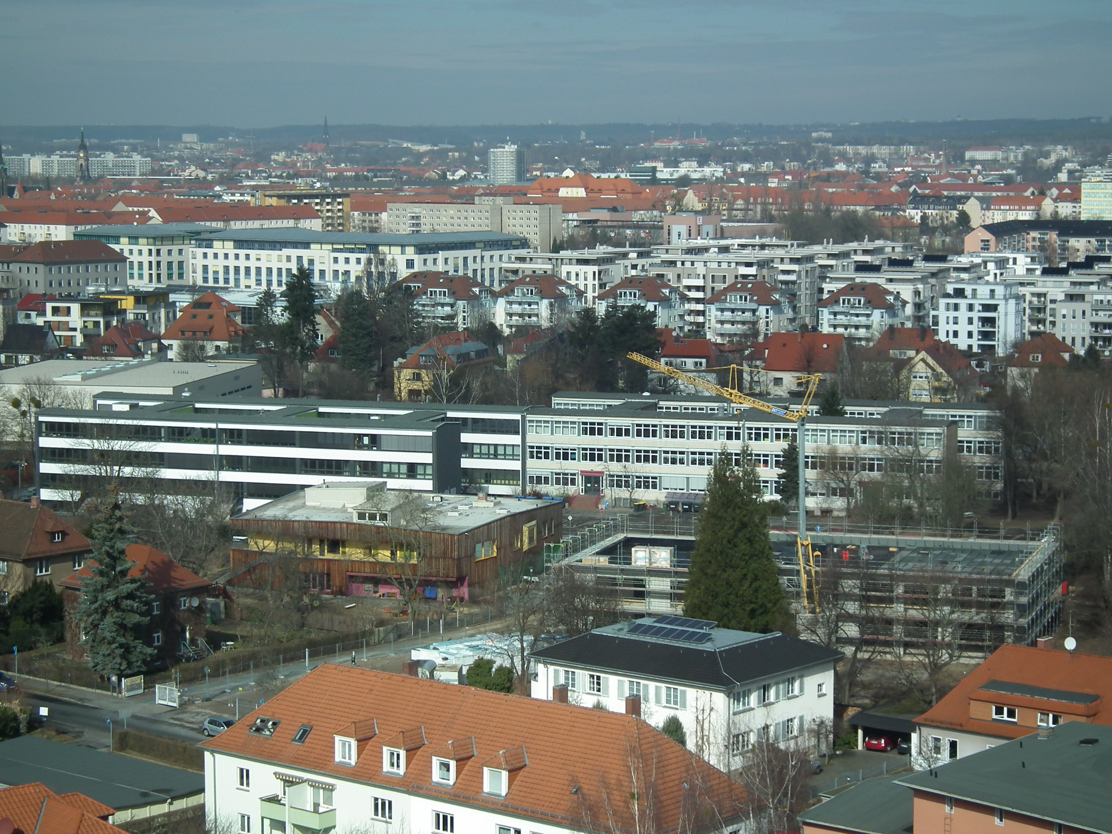 Blick vom Hochhaus Postelwitzer Straße 2, Gruna (Dresden)